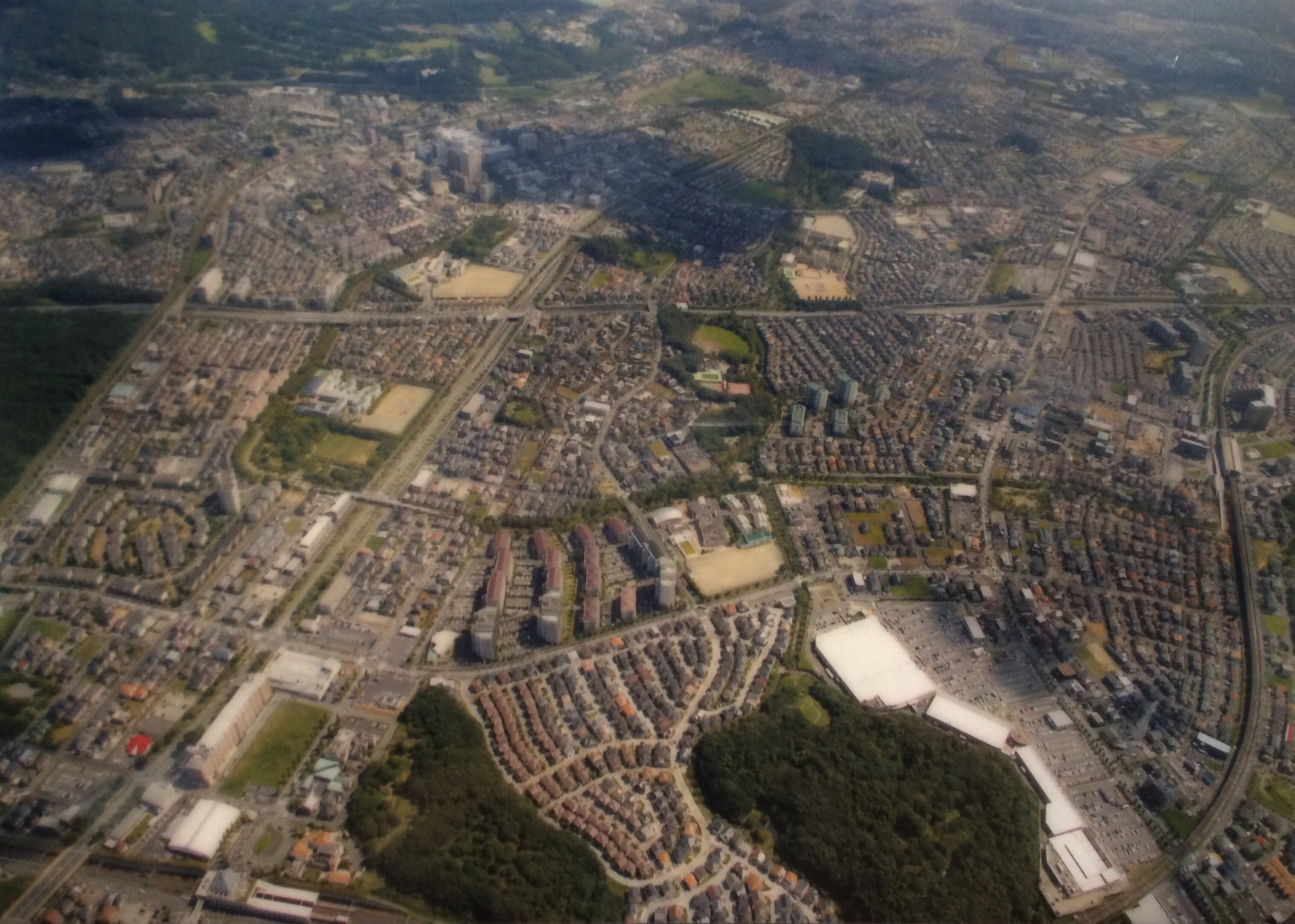 おゆみ野の上空写真